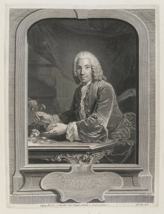 Lapopelinière (Alexandre Jean Joseph le Riche), fermier général. Estampe tirée d'une gravure exécutée par Jean-Joseph Balechou d'après un tableau perdu de Louis Vigée. Sous le portrait figurent les vers suivants : Pour ces fleurs il n'est qu'un printemps Du moins la vie a son automne Prenons ce que le sort nous donne Et connaissons le prix du temps.